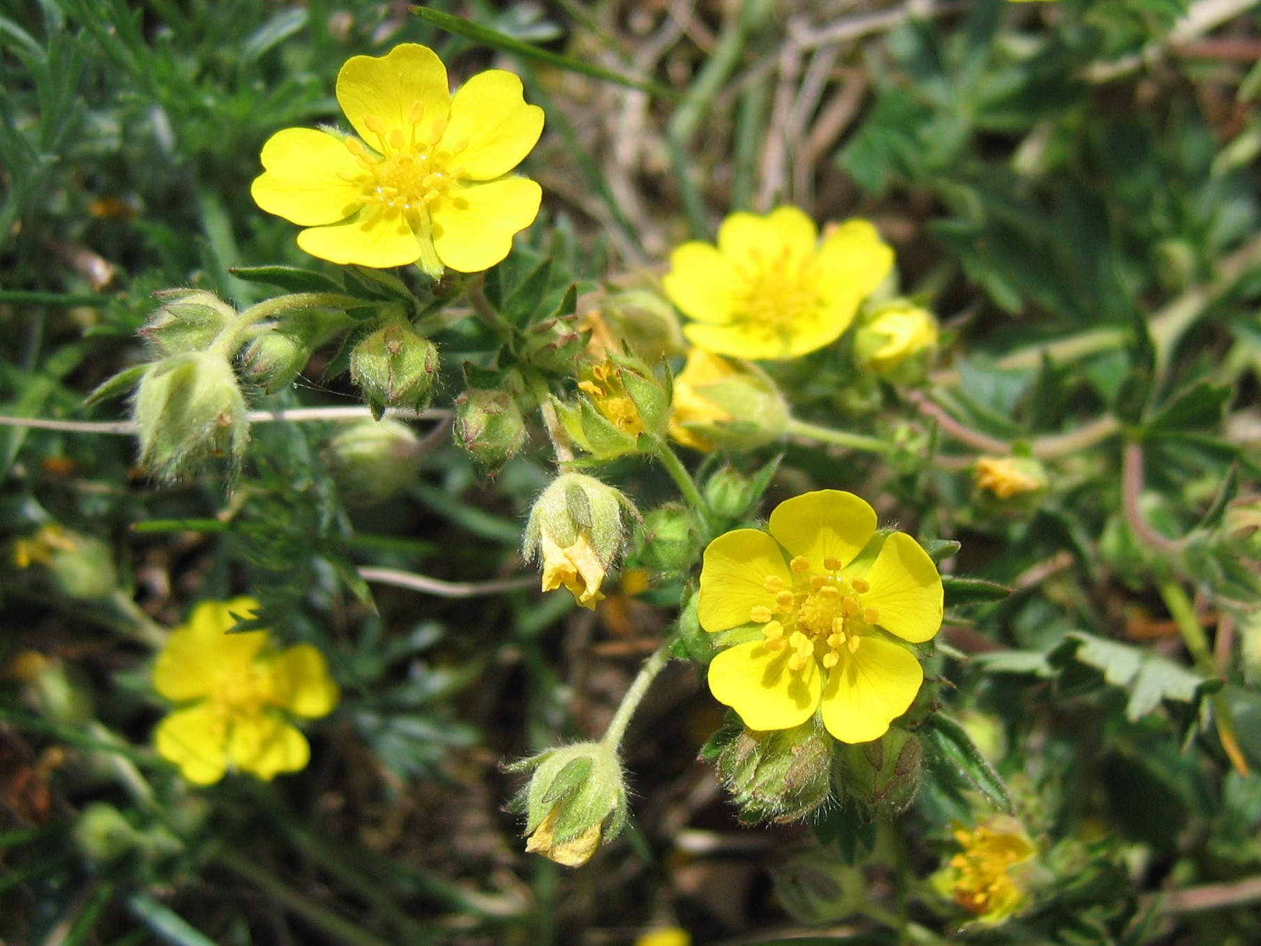 Pięciornik wiosenny (Potentilla pusilla, syn. Potentilla neumanniana), Polska.